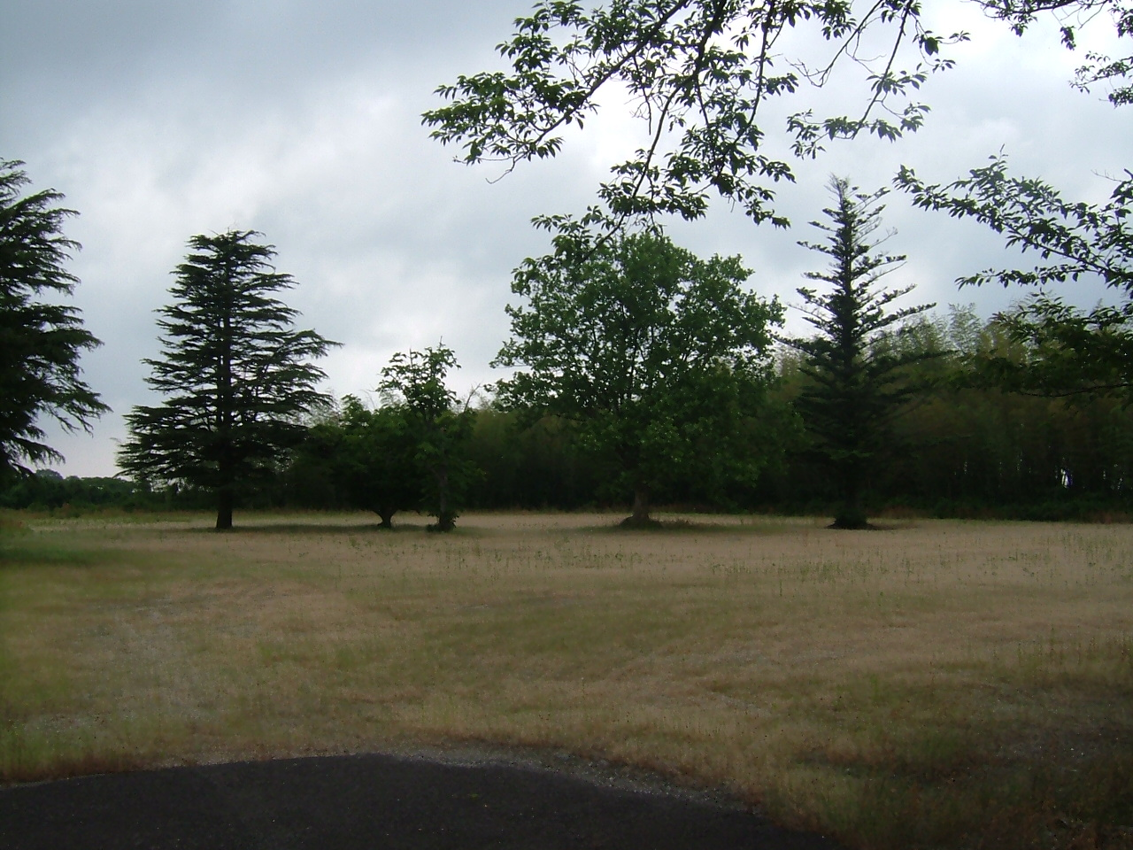 大山町立光徳小学校陣構分校跡